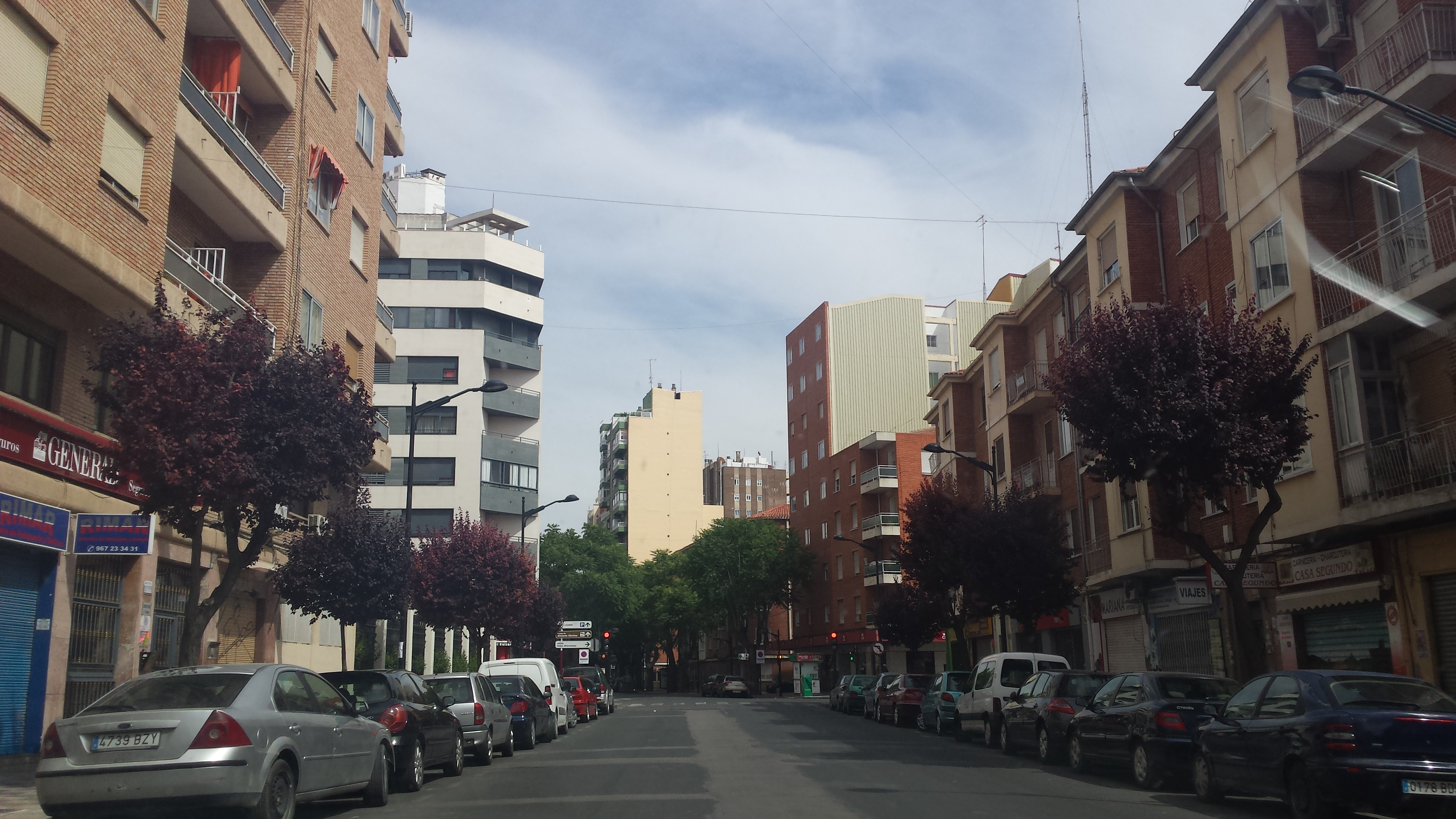 Calle Arquitecto Vandelvira. Albacete